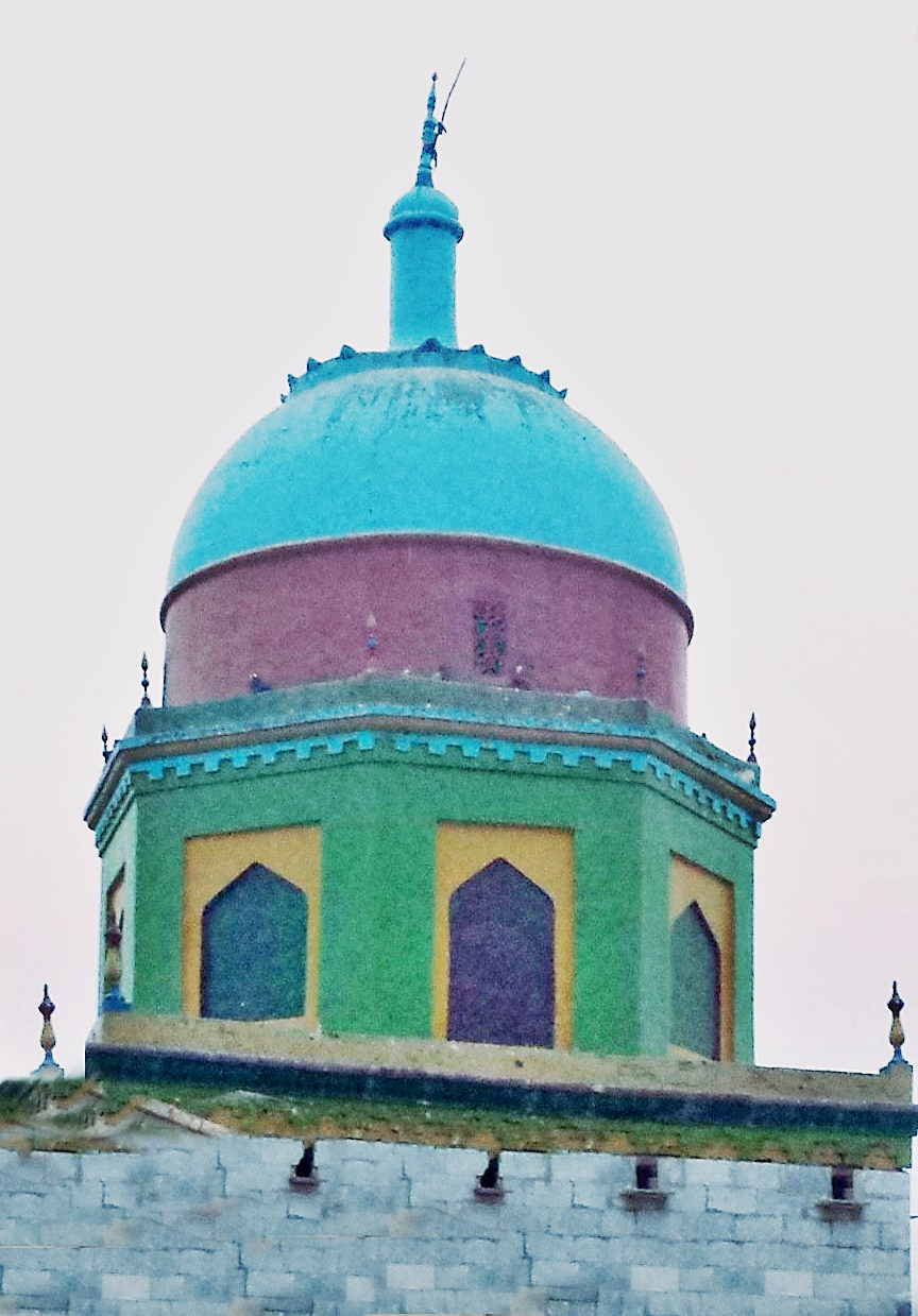 نواب سائیں کا مقبرہ